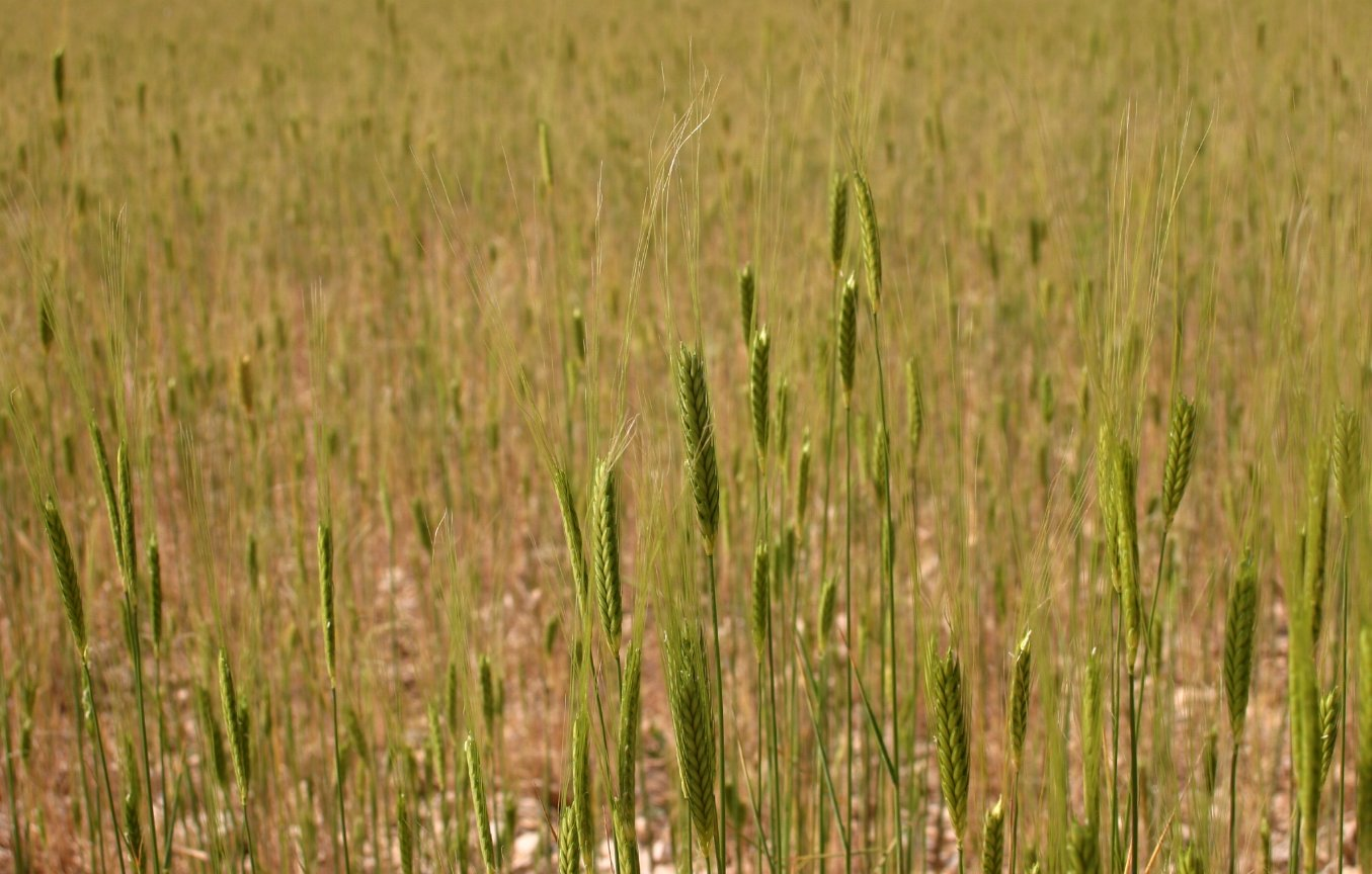 Triticum monococcum: Field near Sault, Provence